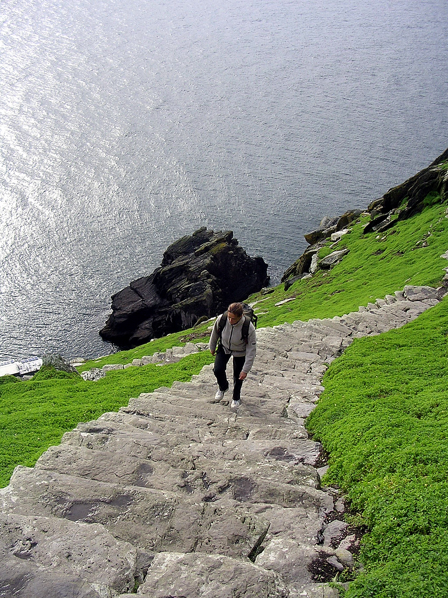 Skellig Michael, walking up to behive huts